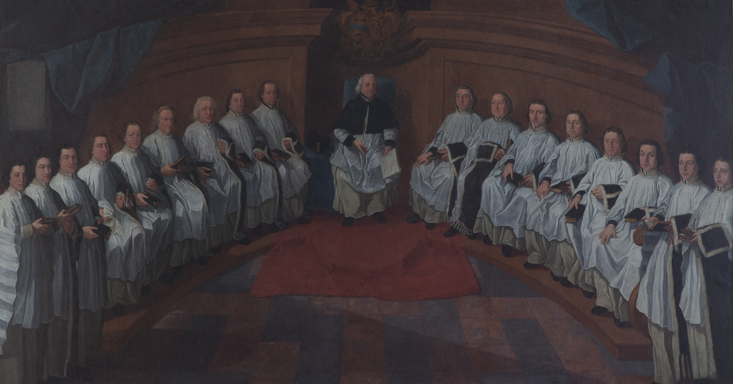 Onbekende meester - schilderij met de voorstelling van een abt en zijn kanunniken, hoogstwaarschijnlijk van de intussen verdwenen Sint-Pietersabdij te Lo, België - schilderij in de Sint-Pieterskerk te Lo